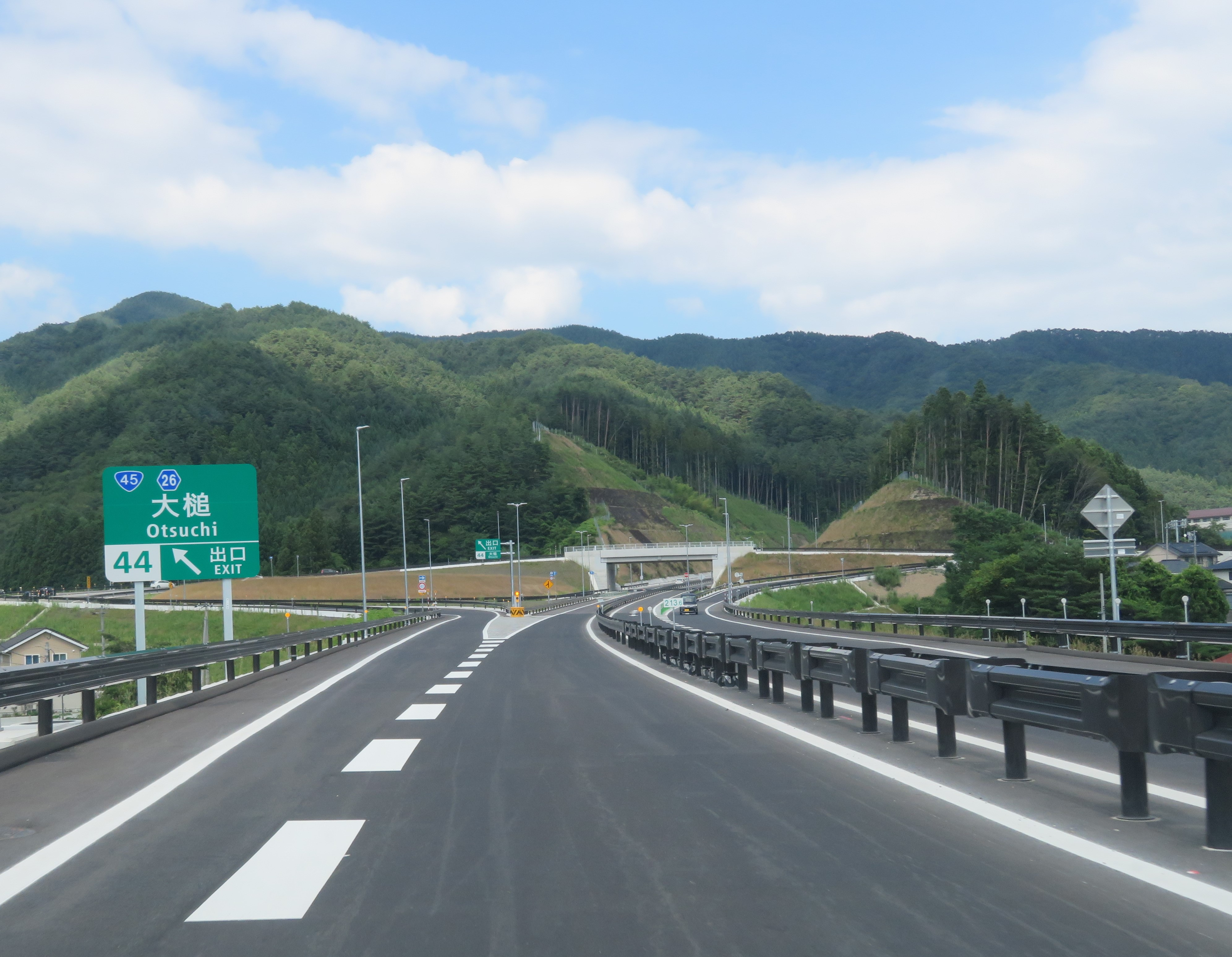 三陸自動車道大槌インターチェンジ出口付近（釜石ＪＣＴ方面側から撮影）